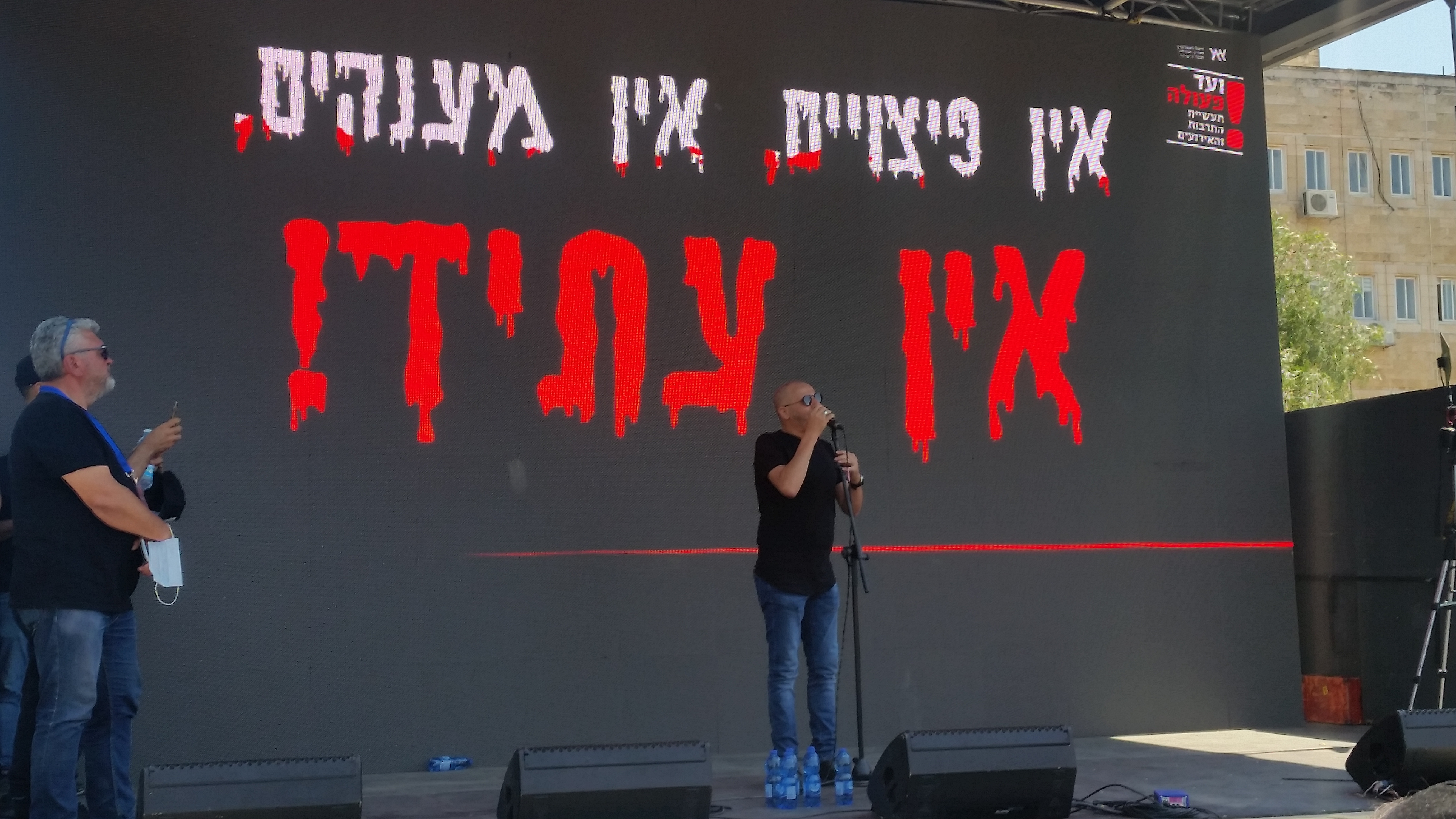 הפגנת תעשיית התרבות בירושלים